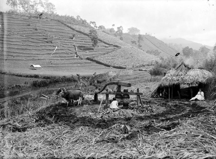 Negatief. met Adee, de vrouw van Dr. Pedro Arens (?). Een suikerrietmolen bij Poedjon